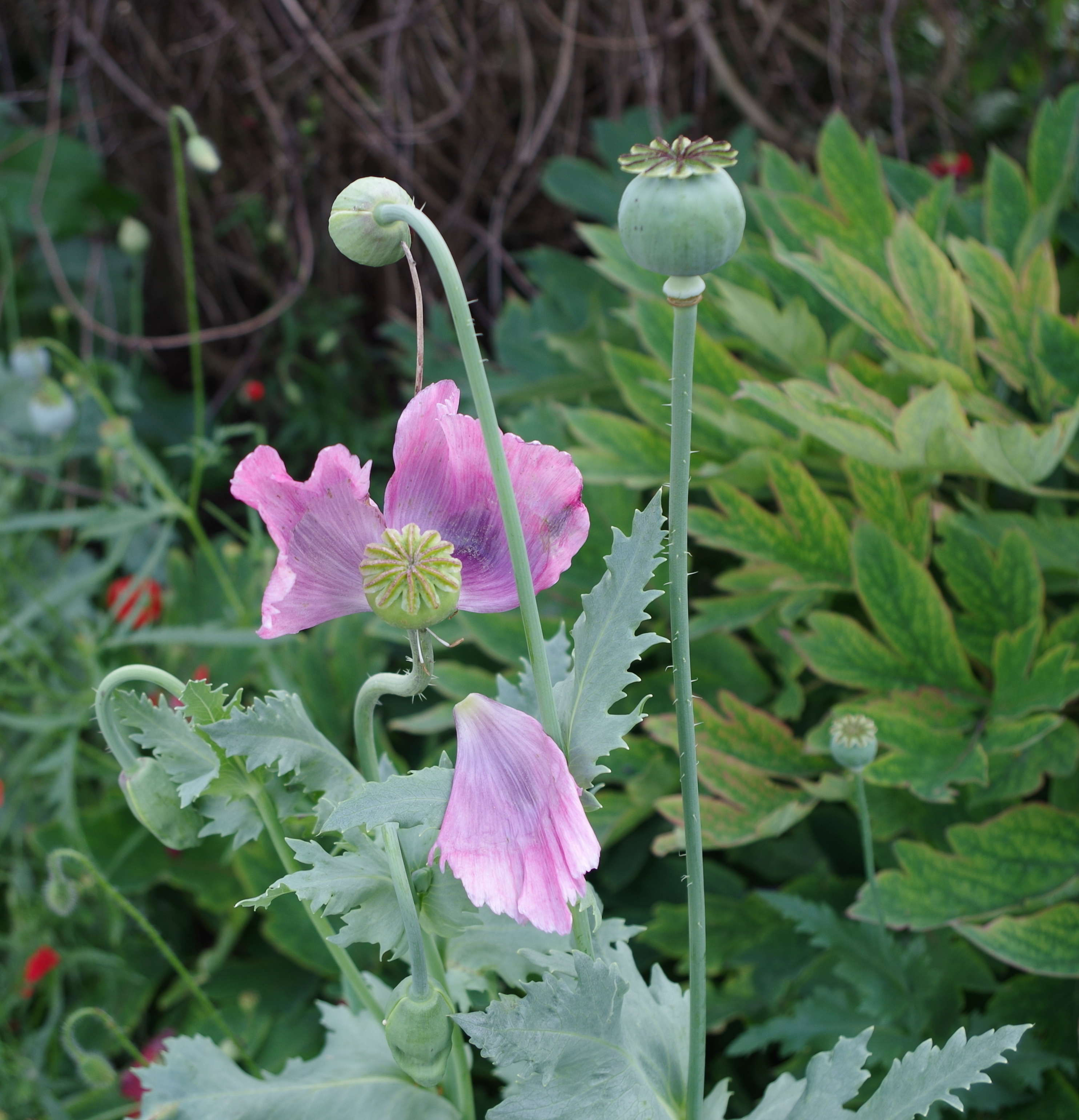 Coquelicots - Parc floral – Papaver somniferum